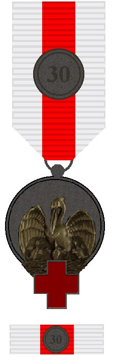 Bloeddonormedaille